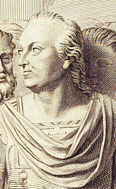 Friedrich Eugen von Württemberg, Ausschnitt aus einem Stich zum Denkmal der Gattenzärtlichkeit von Philipp Jakob Scheffauer